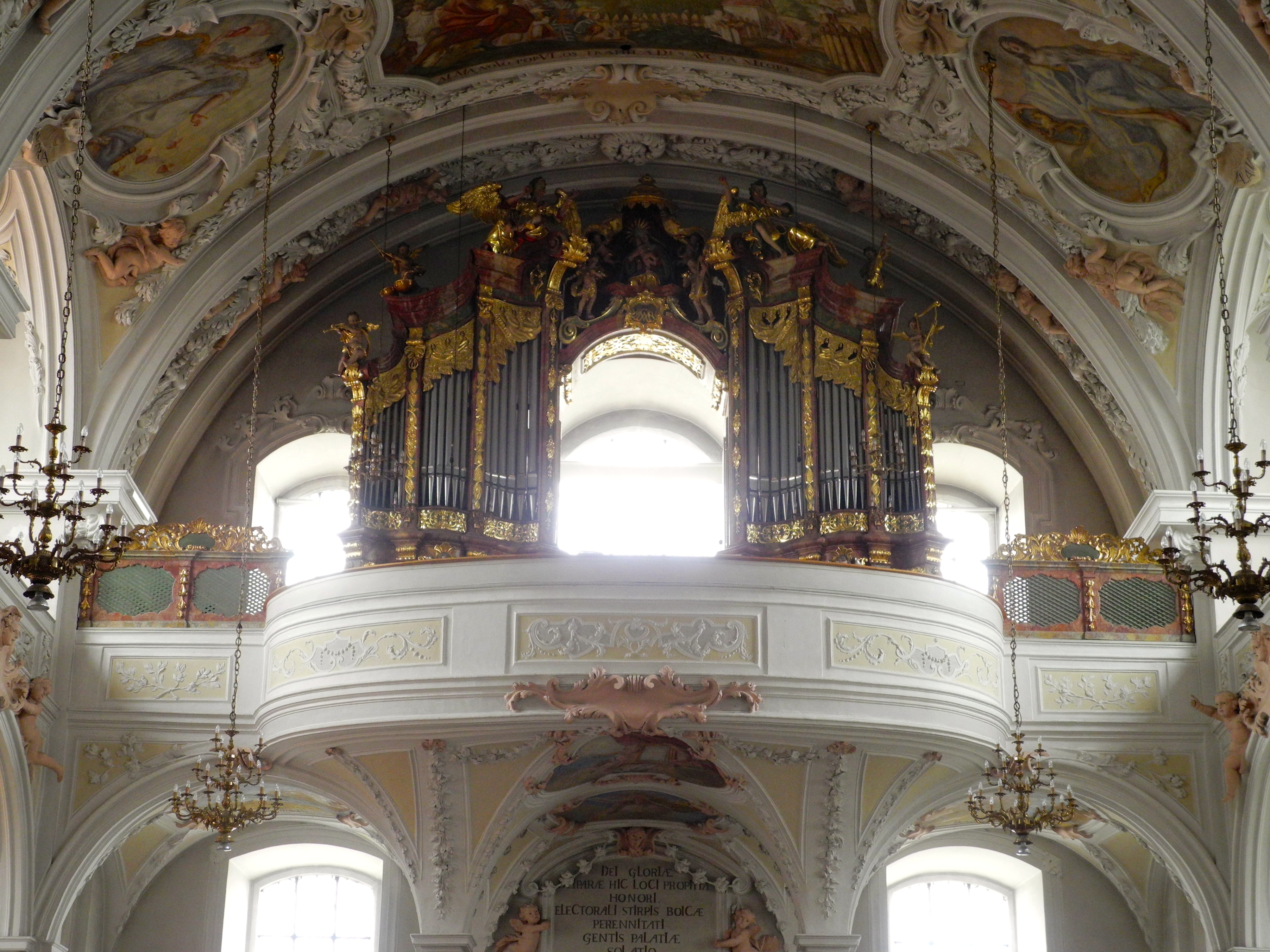 Gehäuse von Funtsch 1733